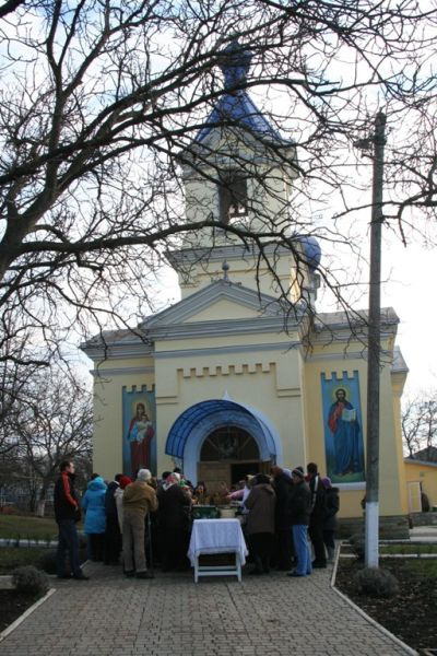 Fotografie, fața bisericii din satulu Colonița